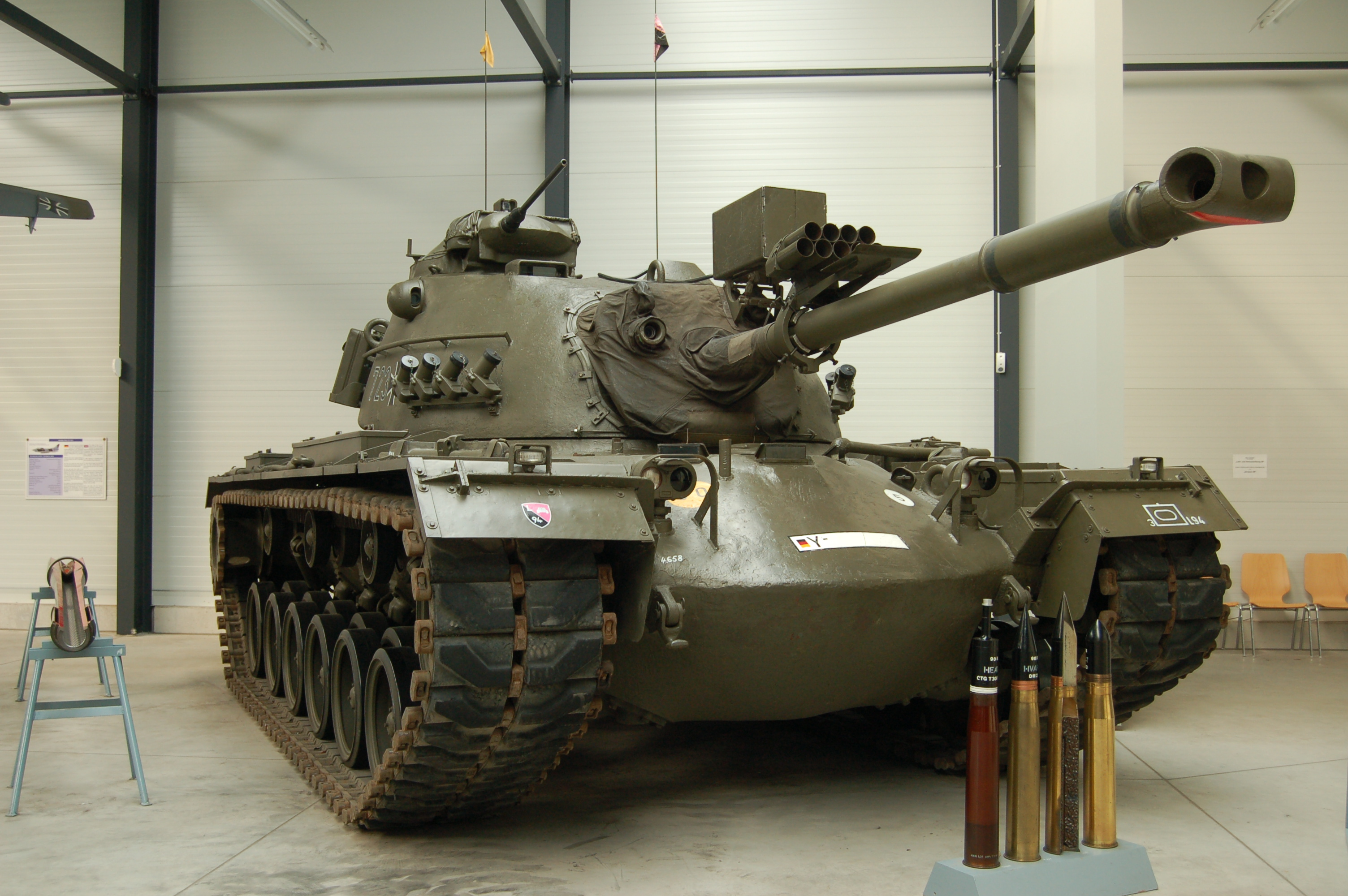 Mittlerer Kampfpanzer M 48 A2 C "Patton" Besatzung: 4 Soldaten Gewicht: 47,5 Tonnen Motorleistung: 615 kW (836 SAE-PS) Bewaffnung: 1 Bordkanone 90 mm L/48, sowie Blenden u. Flieger-Abw.-MG Baujahr: 1955 - 1960 Stückzahl Bw: 1.492 Stückzahl gesammt: 11.703